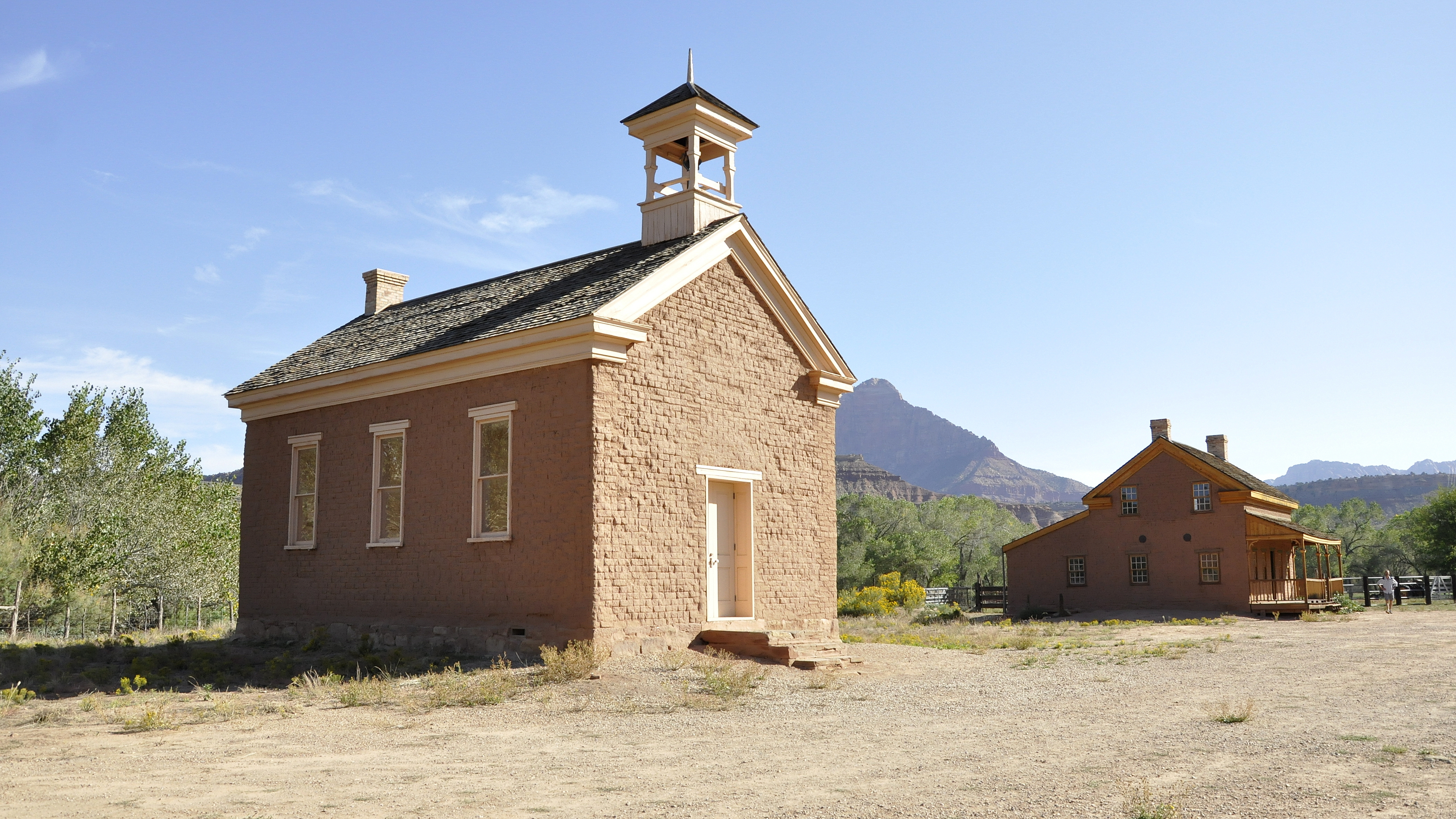 Grafton, Utah - vooraan uit 1886 de voormalige kerk, schoolgebouw en gemeenschapshuis